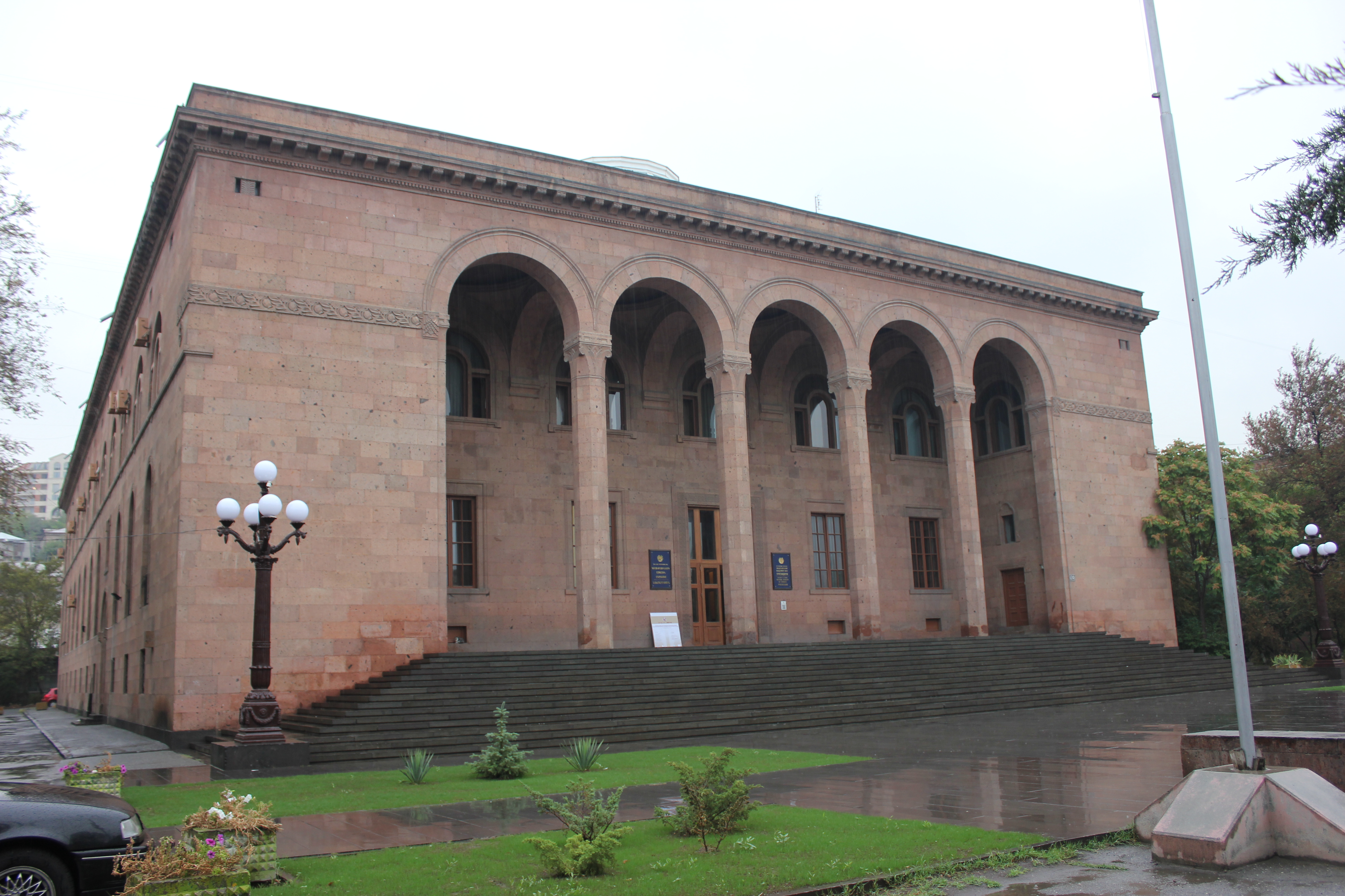 ՀՀ Գիտությունների Ազգային Ակադեմիա, Գլխավոր մասնաշենք, Ճարտ.` Ս. Սաֆարյան, Մ. Մանվելյան 1958 թ. 6/1.1